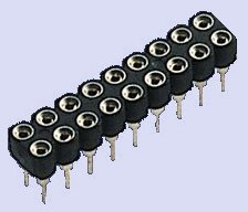 Buchsenleiste doppelreihig 2x9 18-polig gerade.